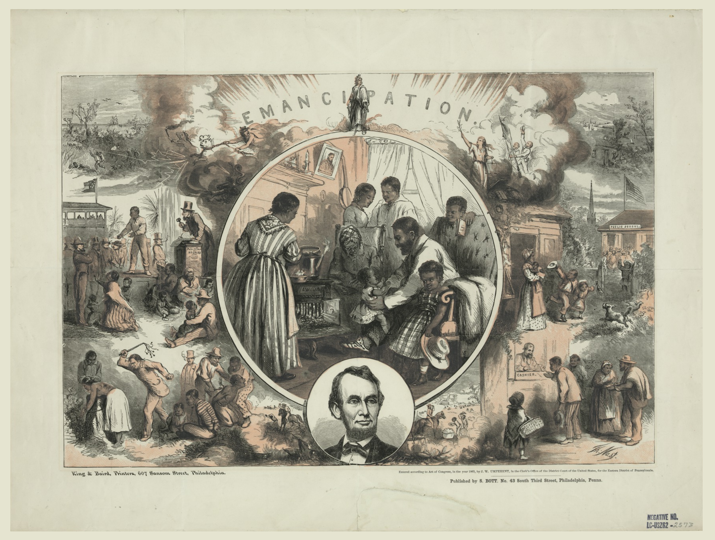 Thomas Nast (1840-1902), Umpehent, J. W.− Emancipation, S. Bott, Philadelphie.Caricature optimiste et manichéenne à propos de l'abolition de l'esclavage après la Guerre de Sécession, guerre civile américaine, 1861-1865. Description complète.